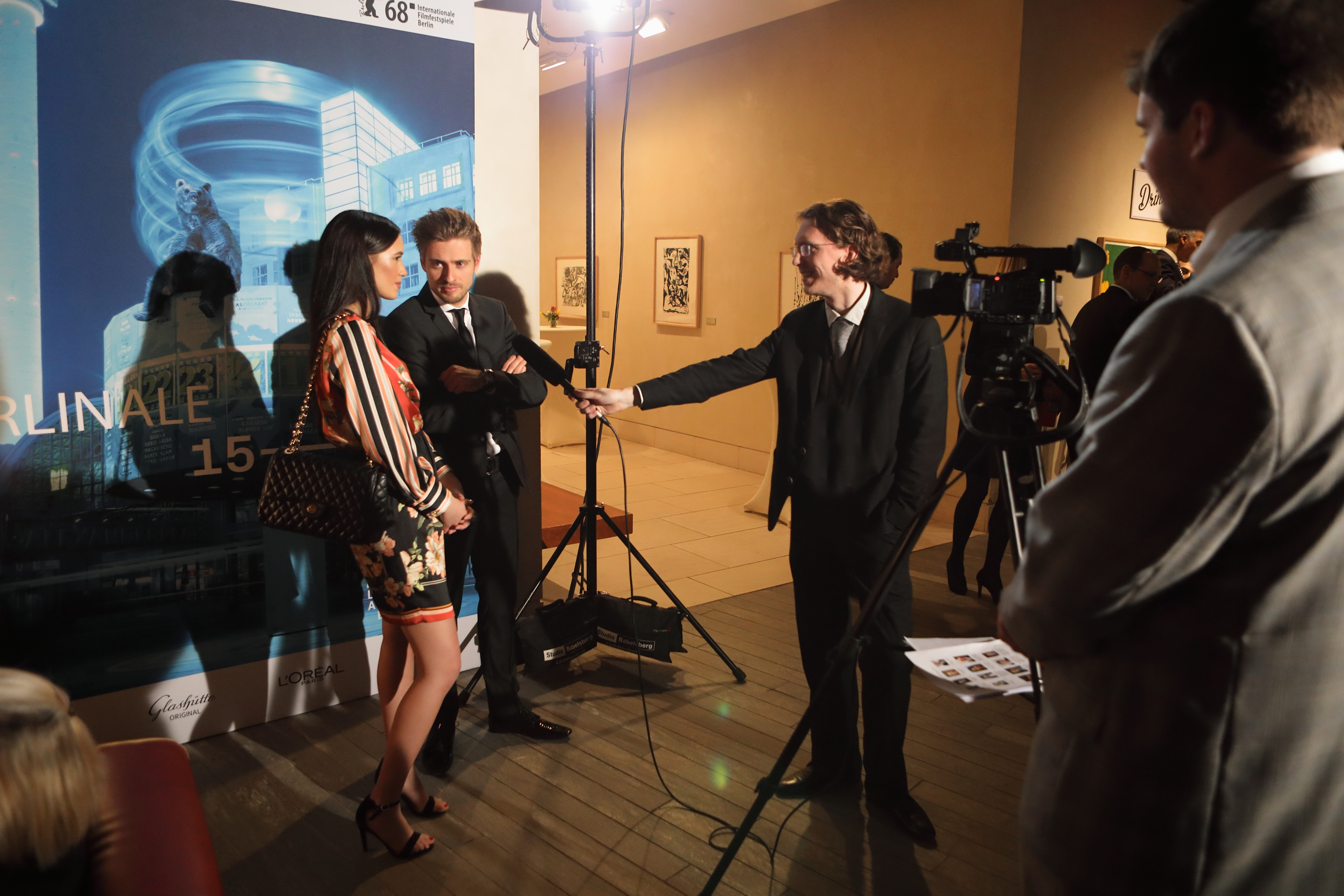 Hanna Weig, Jörn Schlönvoigt, and interviewer ? at Berlinale Reception 2018